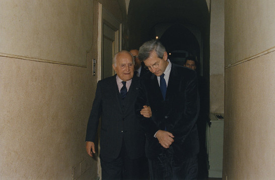 Il Presidente della Camera dei deputati, Luciano Violante, si reca nella Sala del Cenacolo con il Capo dello Stato, Oscar Luigi Scalfaro